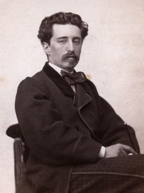 Eduardo De La Barra Lastarria (Santiago, 1839-1900), chileno, distinguido diplomático, ingeniero geógrafo, filósofo, crítico literario, periodista y escritor. Fue uno de los clásicos de la literatura chilena, cuya obra se inscribe dentro del romanticismo. Su obra fue publicada en Chile, Francia y Argentina.